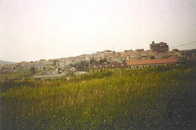 Pannorama von Capracotta